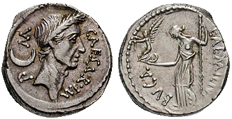 Julius Caesar. February-March 44 BC. AR Denarius (3.95 gm). L. Aemilius Buca, moneyer. CAESAR IM P M, laureate head right; crescent behind / L AEMILIVS BVCA, Venus standing left, holding Victoria and sceptre. Crawford 480/4; Sear, CRI 102; Alföldi pl. XXV, 19 = Banti 86/18 = Sydenham 1060; RSC 22. A. Alföldi, "Der Denar des L. Aemilius Buca mit CAESAR.IM-P-M. Zur Auswertung der Münzquellen der Geschichte des Jahres 44 v.Chr.," SM 58 (1965), pl. 3, 4